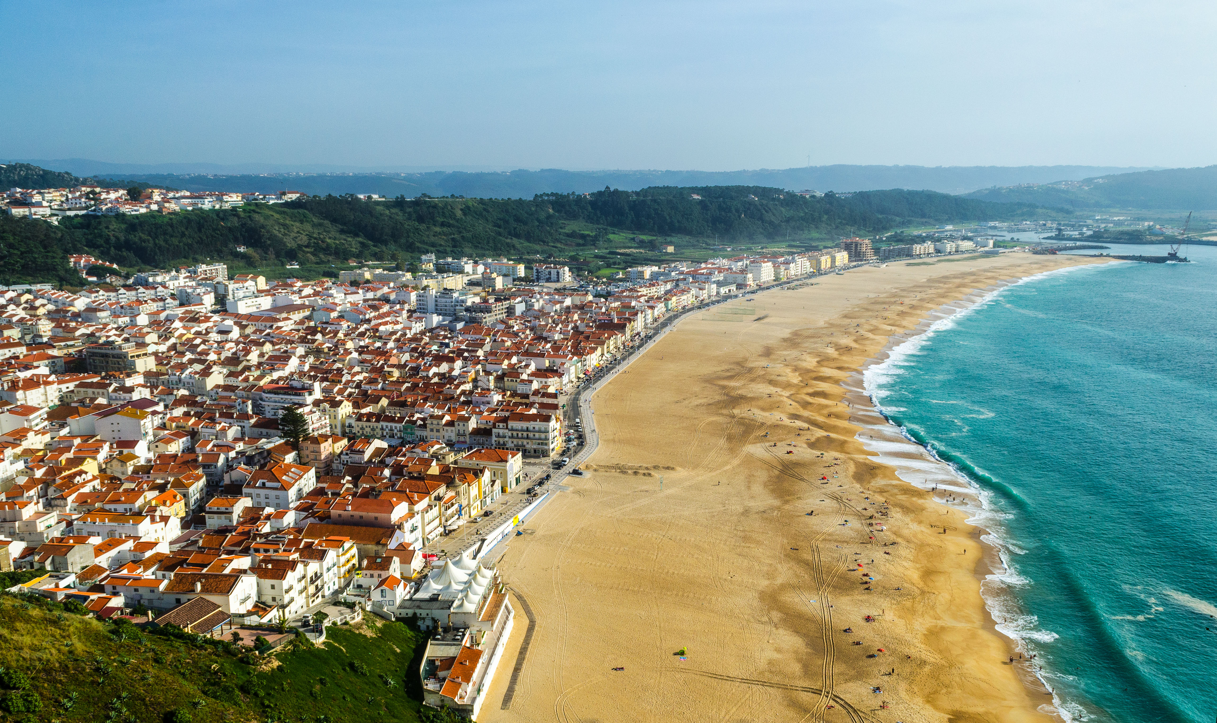 Nazare